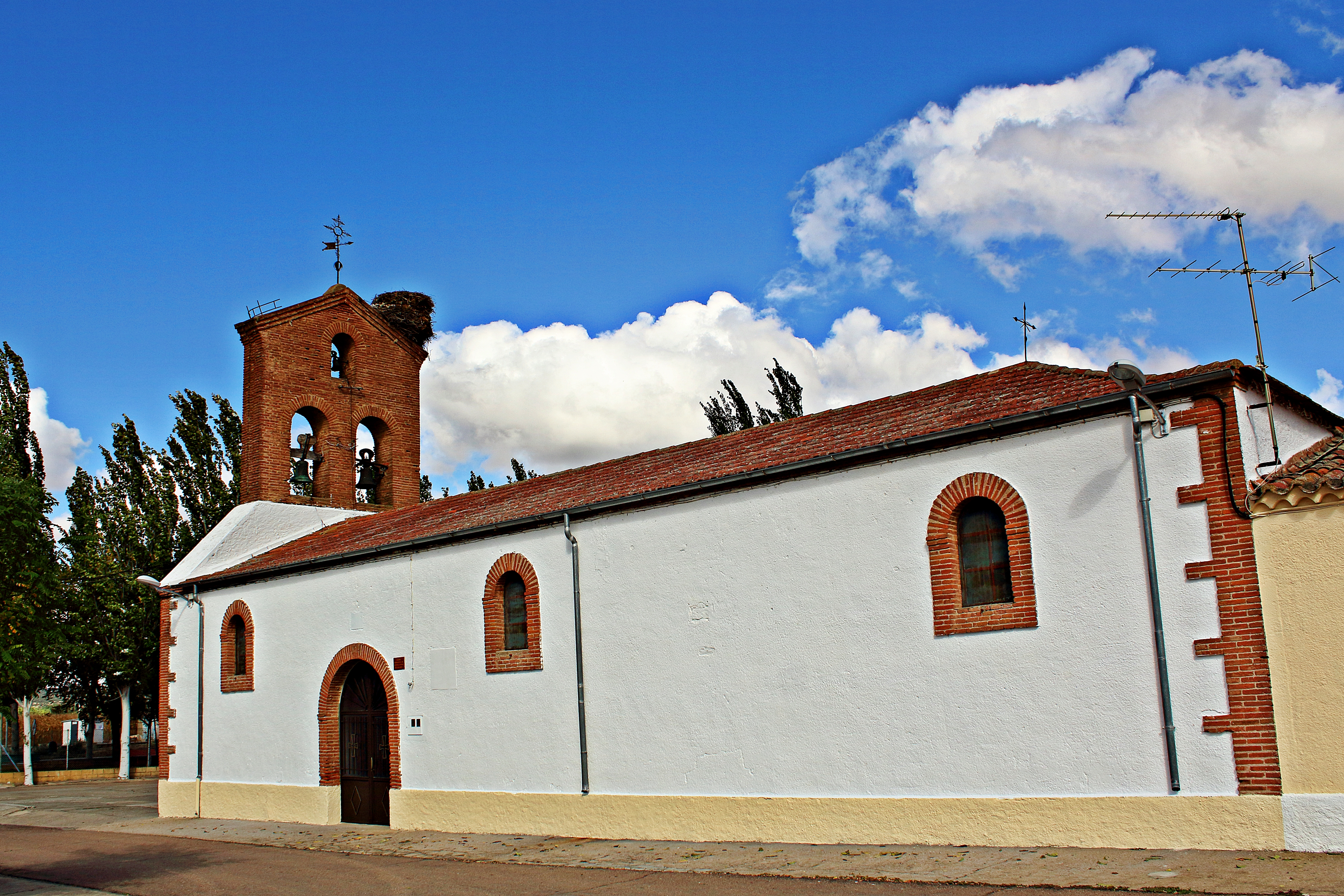 Éjeme municipio de la comarca Tierra de Alba, provincia de Salamanca.